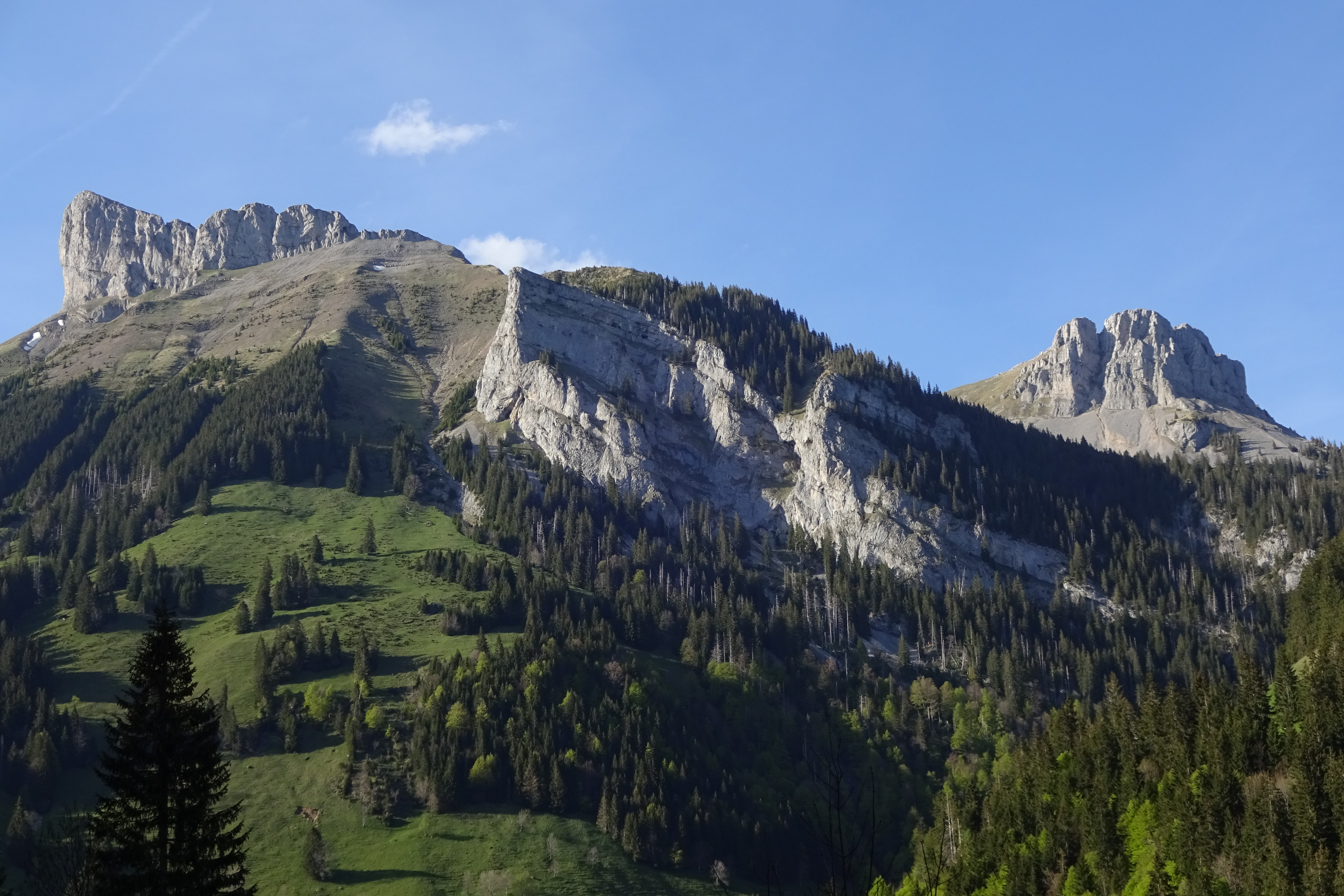 UNESCO Biosphäre Entlebuch (Nr. 1010P) – Schrattenfluh: Schybengütsch (links), Achs (Mitte) & Böli (rechts) von Süden _ Aufnahmestandort: Habkern, ~ 100 m vor Gemeindegrenze zu Schangnau, im Hübeli in der Emmeschlucht oberhalb Kemmeribodenbad – 46°47'38.14" N / 7°57'06.57" O